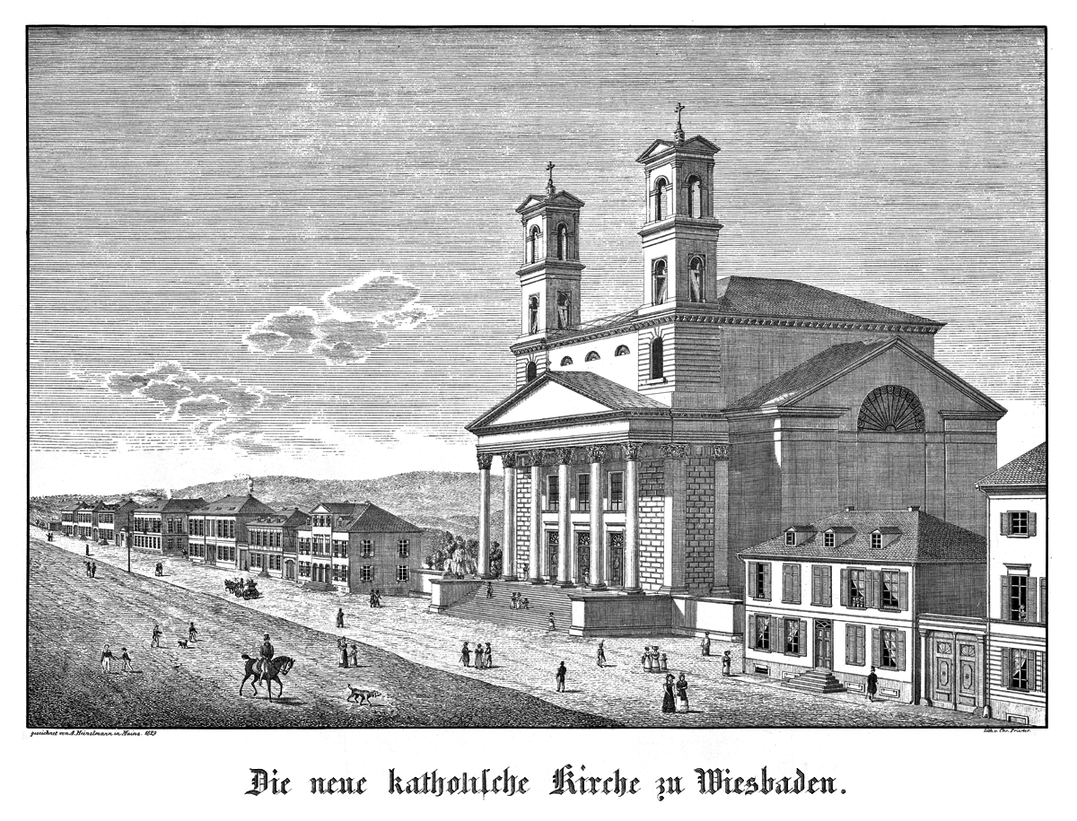 Erste Bonifatiuskirche, Wiesbaden, eingestürzt am 11. Februar 1831